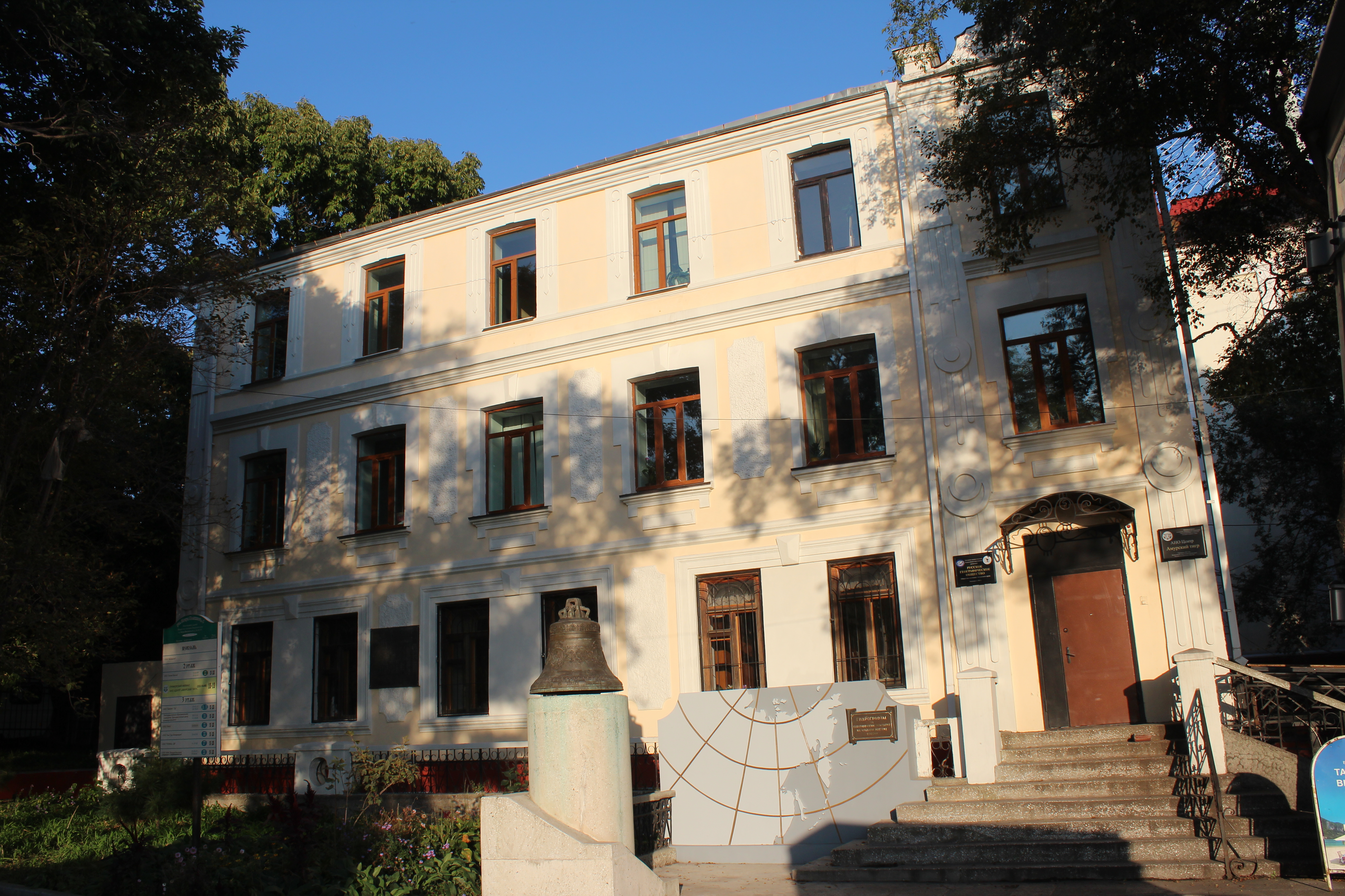 Общество изучения Амурского края: улица Петра Великого, 4, Владивосток, Приморский край